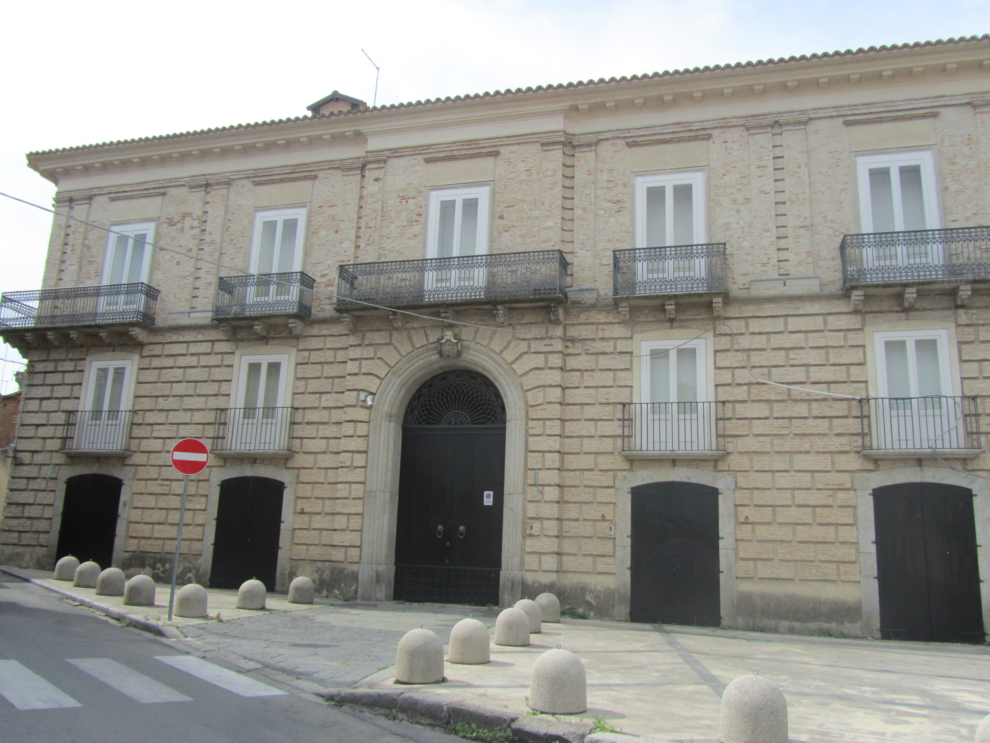 Facciata del Palazzo Contestabile a Taurianova